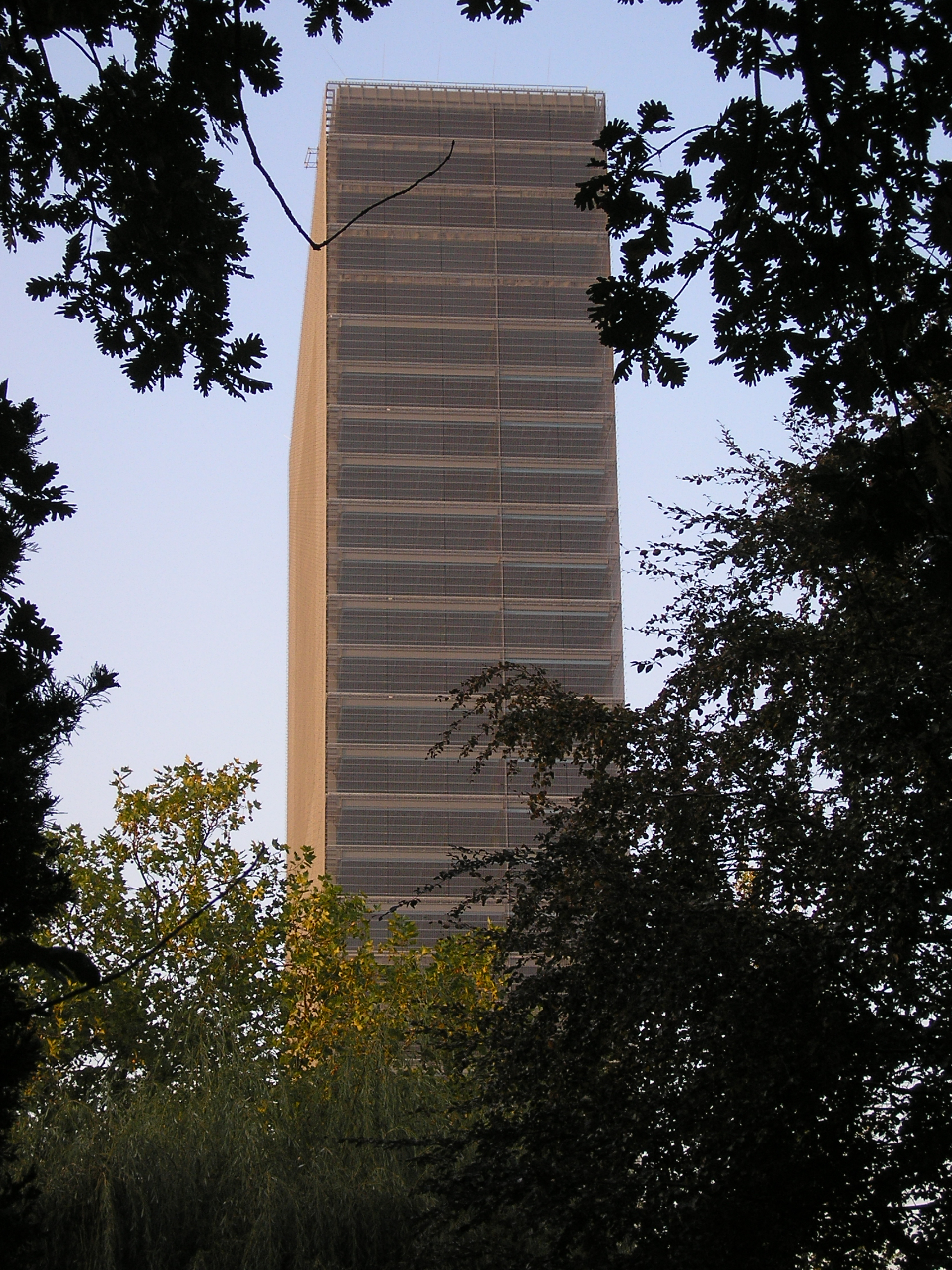 Das Bayer-Hochhaus wird zur Medienfassade. Der Leuchtvorhang ist vollständig angebracht. Ansicht von Bayergebäude W1 vom Japanischen Garten.